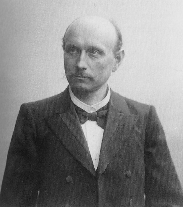 Max Gebbert